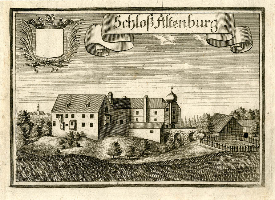 "Schloß Altenburg", aus : Beschreibung des Churfürsten- u. Hertzogthumbs Ober- und Nidern Bayrn. – Rentamt München, 1701